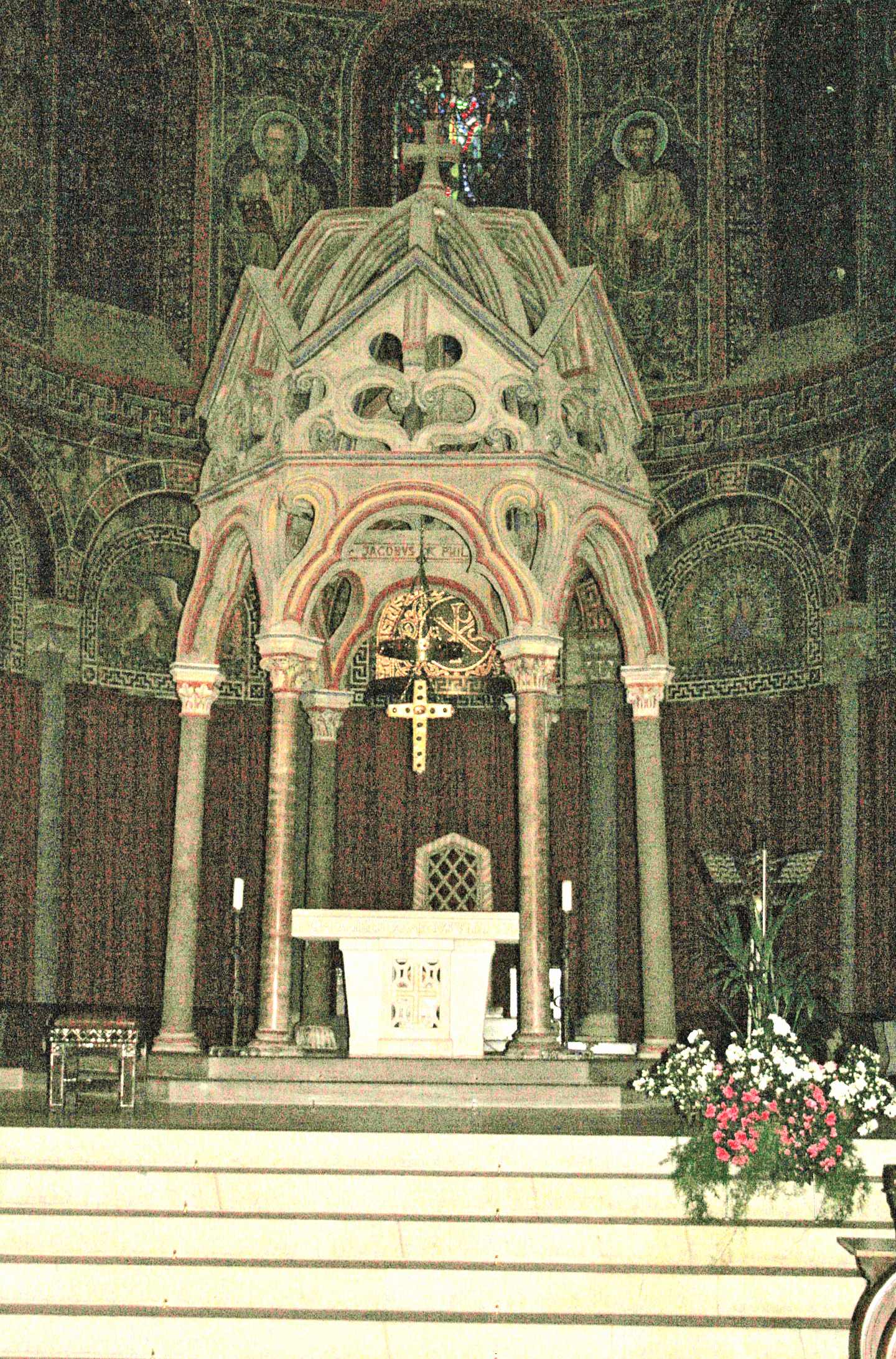 Altor an der Abteikierch Maria Laach.